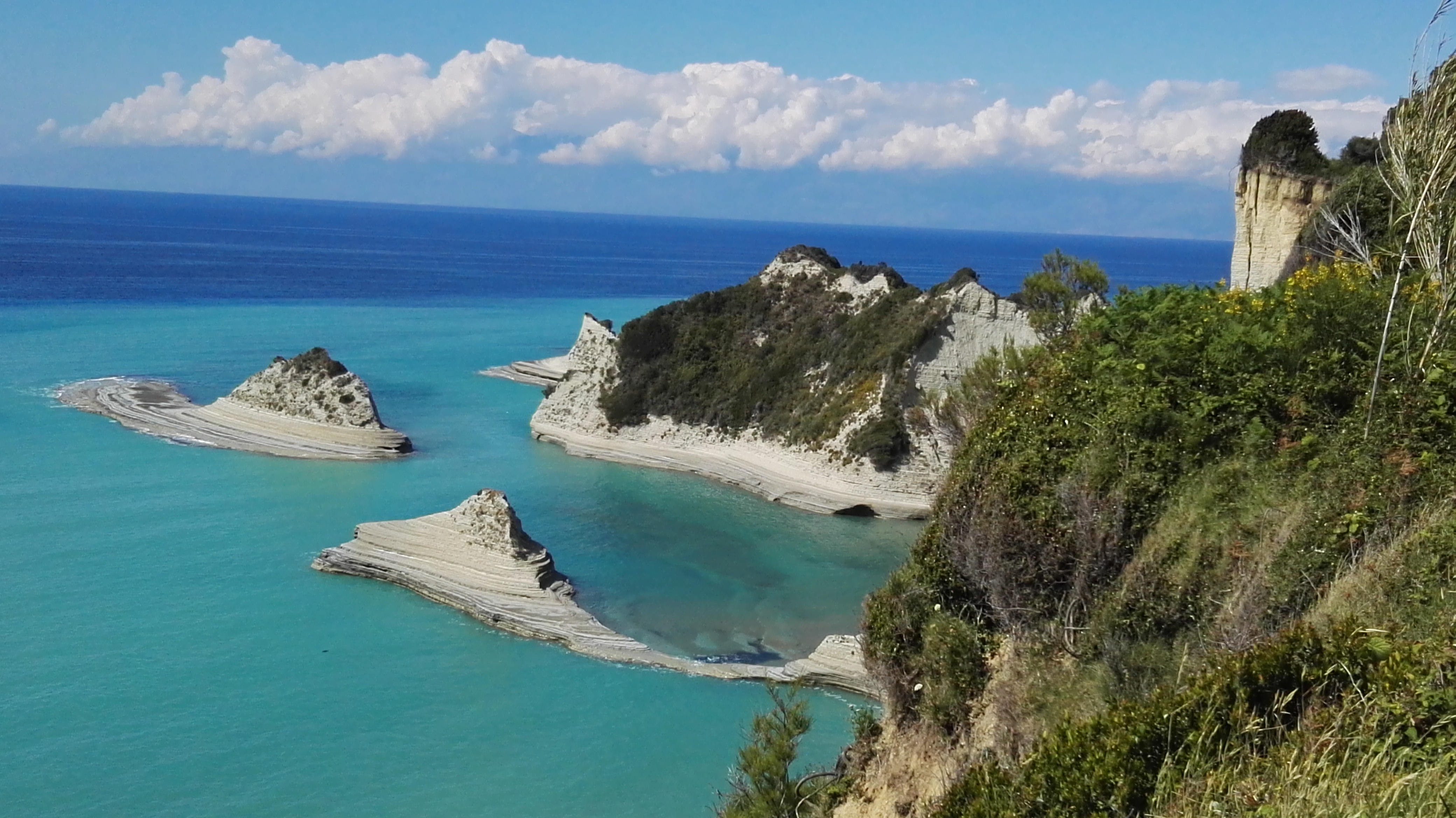 Kap Drastis auf Korfu